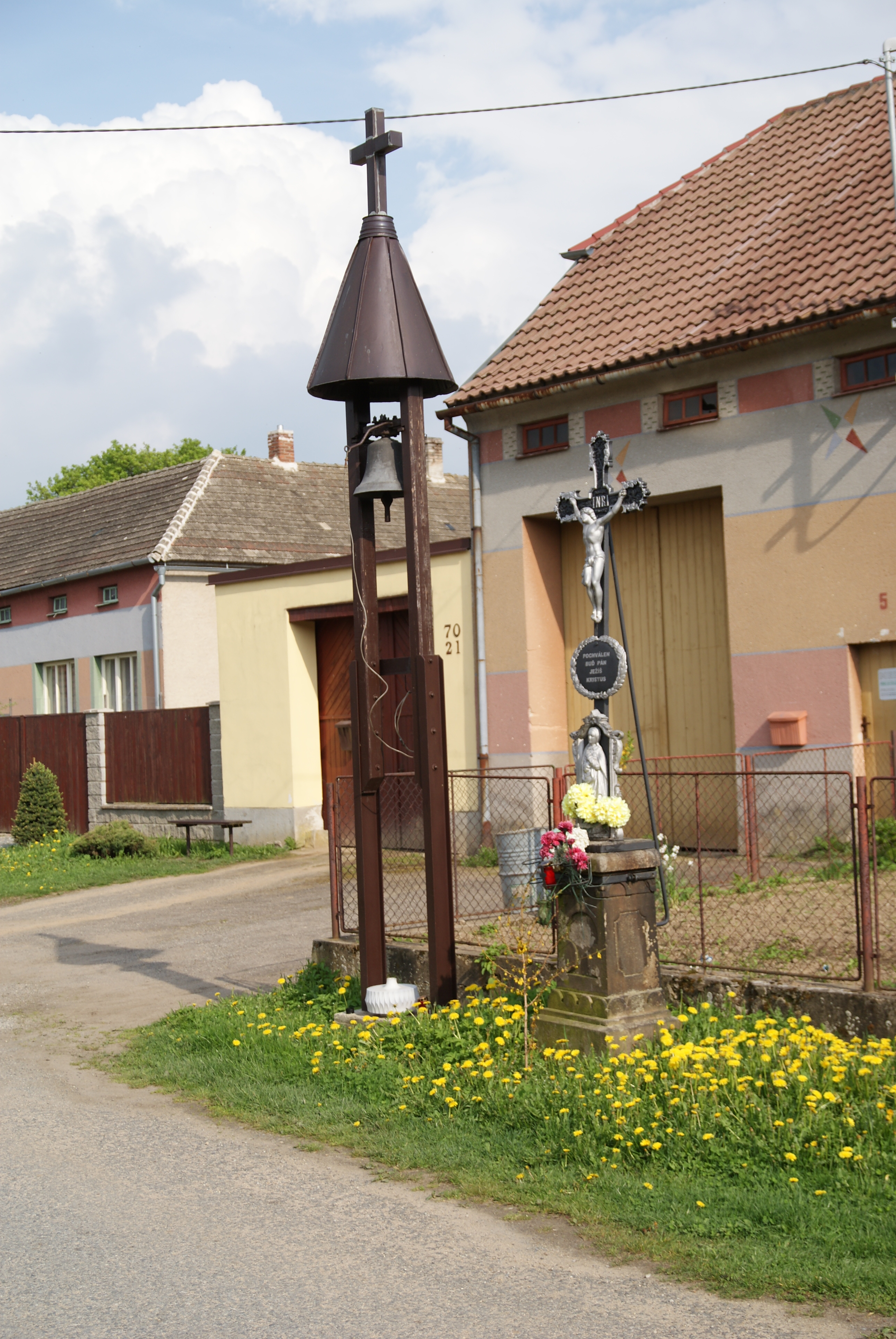 Zvonička v Markvarticích u Třebíče